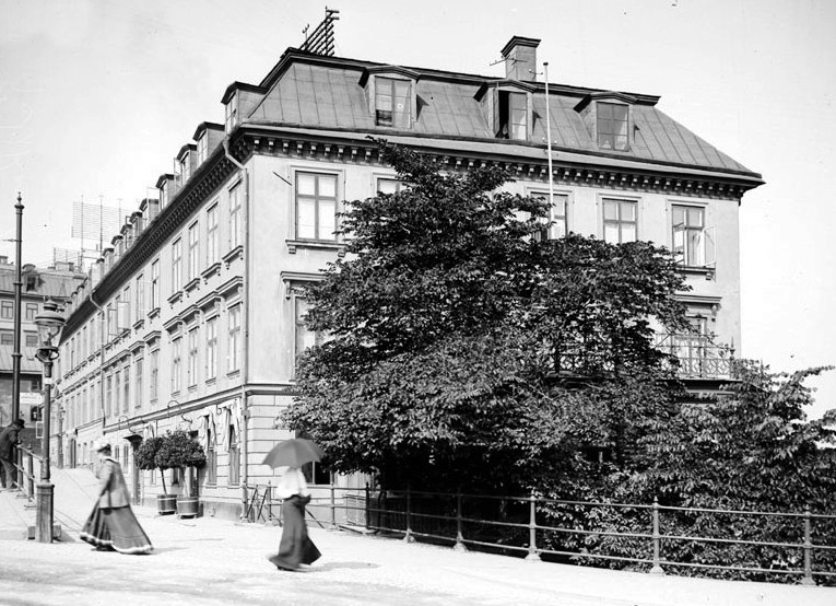 Restaurant Pelikan vid Brunnsbacken 4